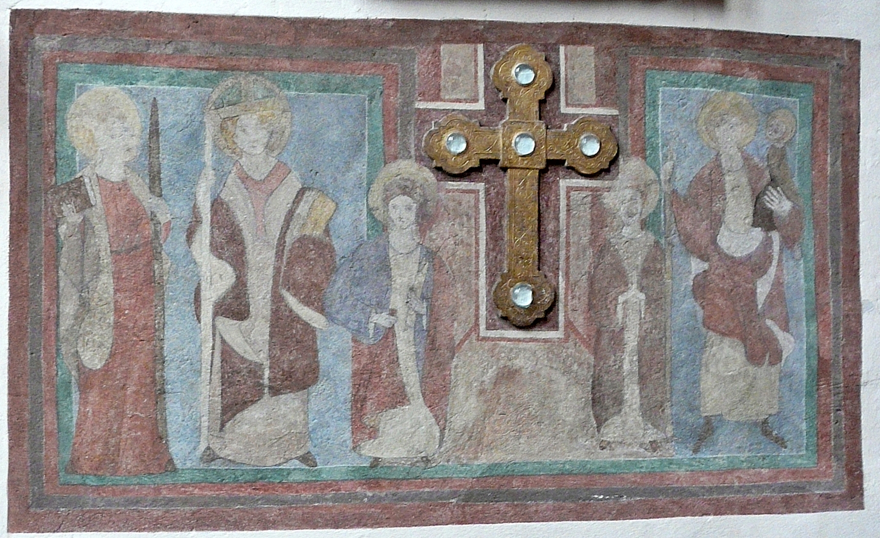 Wandmalerei im Wetzlarer Dom, Wetzlar (Hessen)